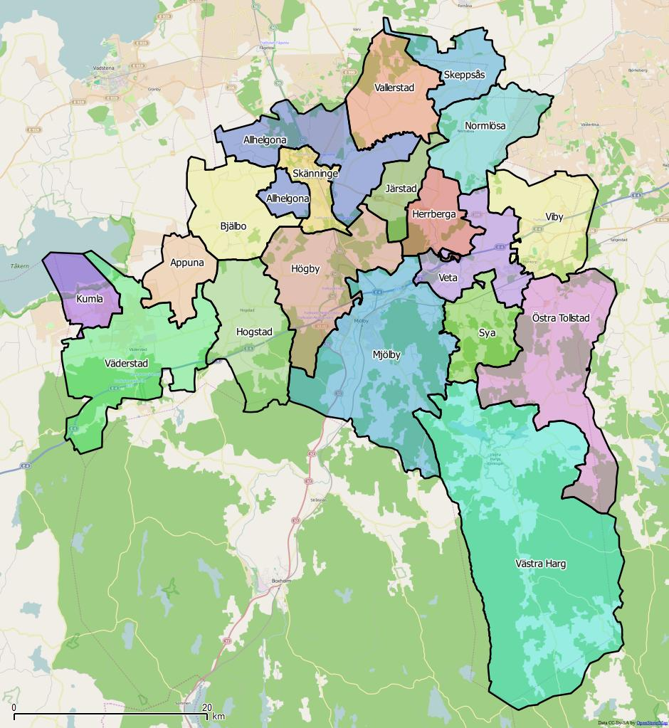 Distriktsindelningen i Mjölby kommun World file: 73.75639825132934391 0 0 -73.75639825132934391 1647031.71274904883466661 8069192.22815413121134043